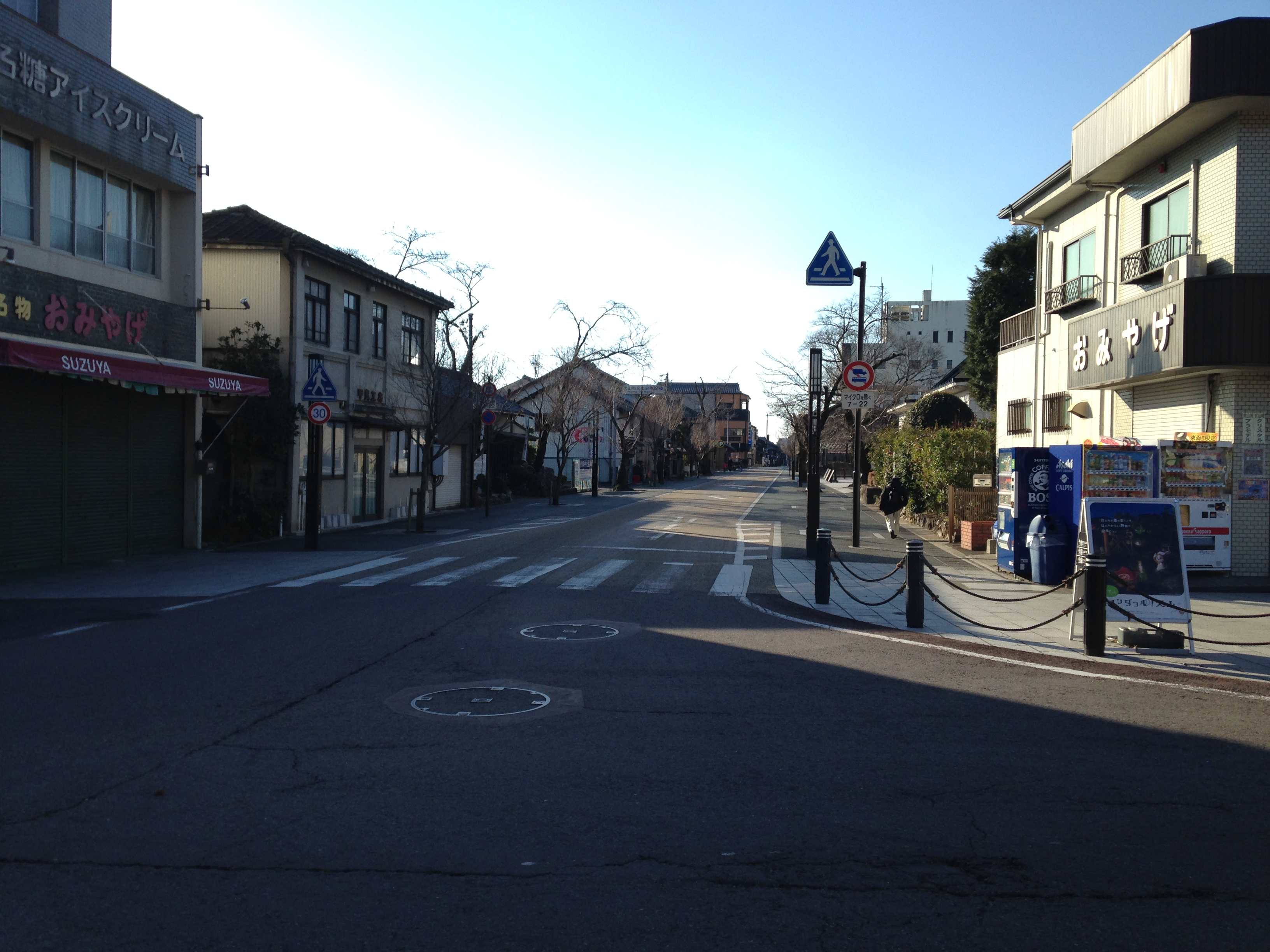 針綱神社前のストリートビュー